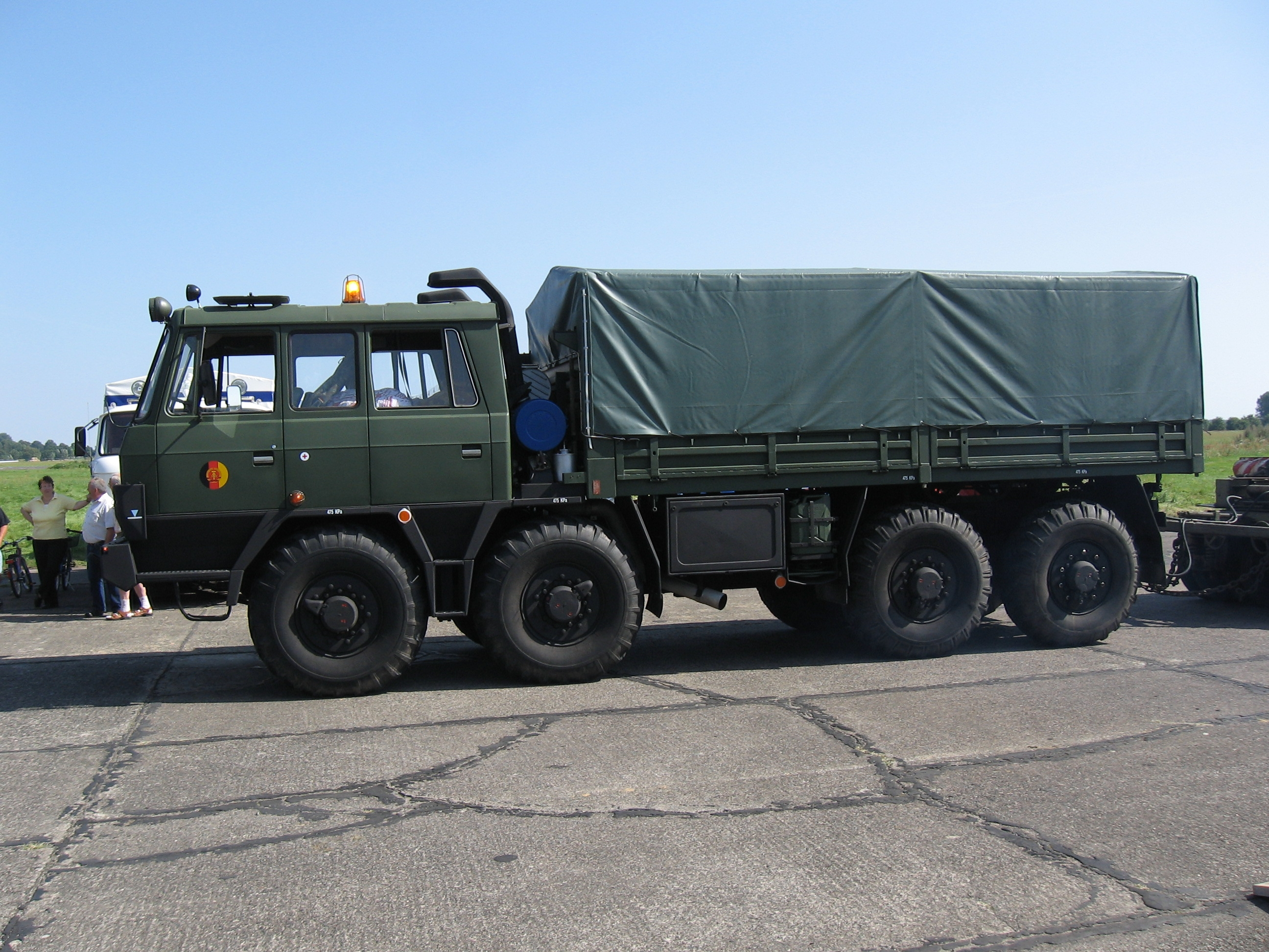 Tatra 815 8x8, Transport- und Zugfahrzeug der NVA